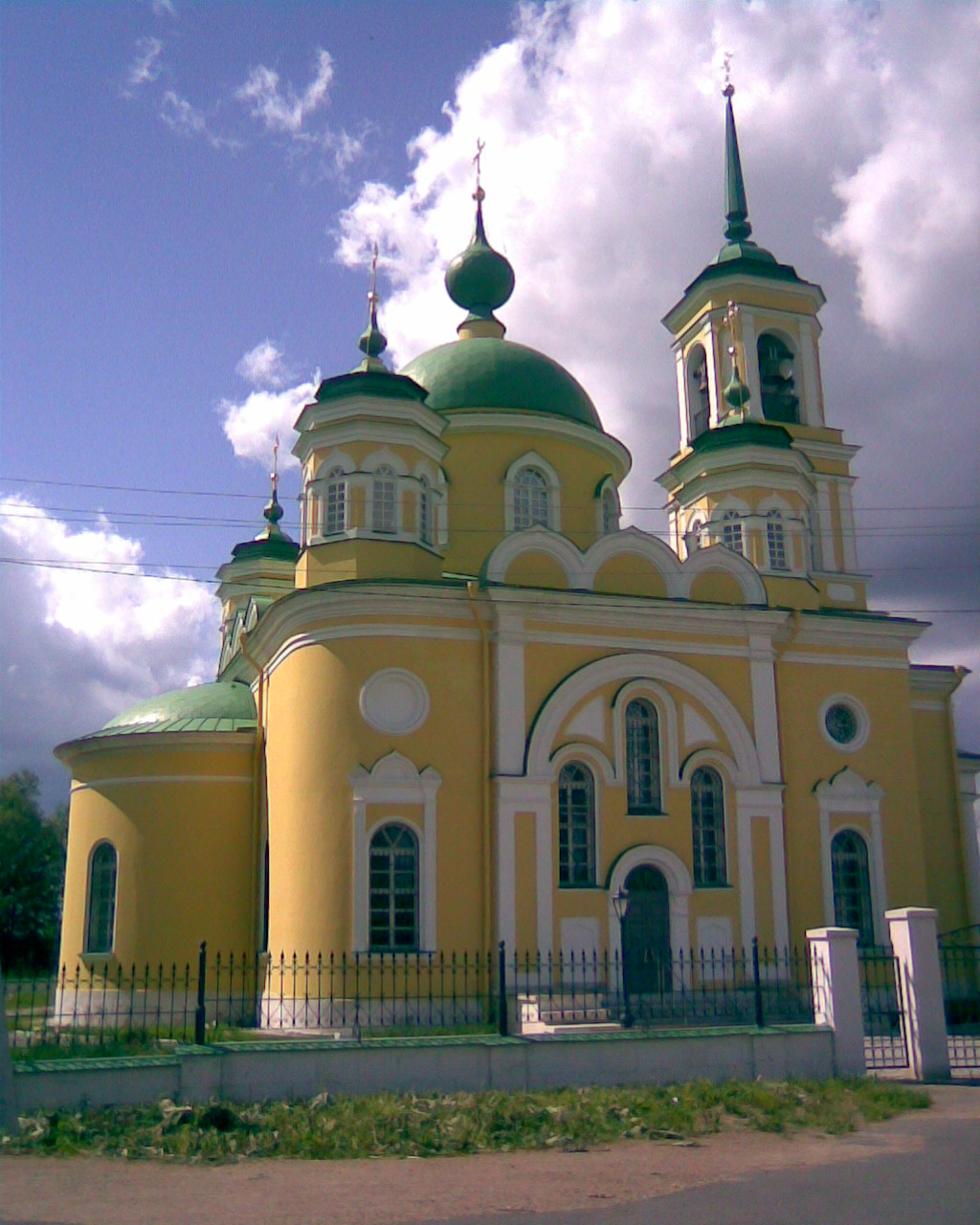 Храм Покрова Богородицы в селе Тургиново Тверской области